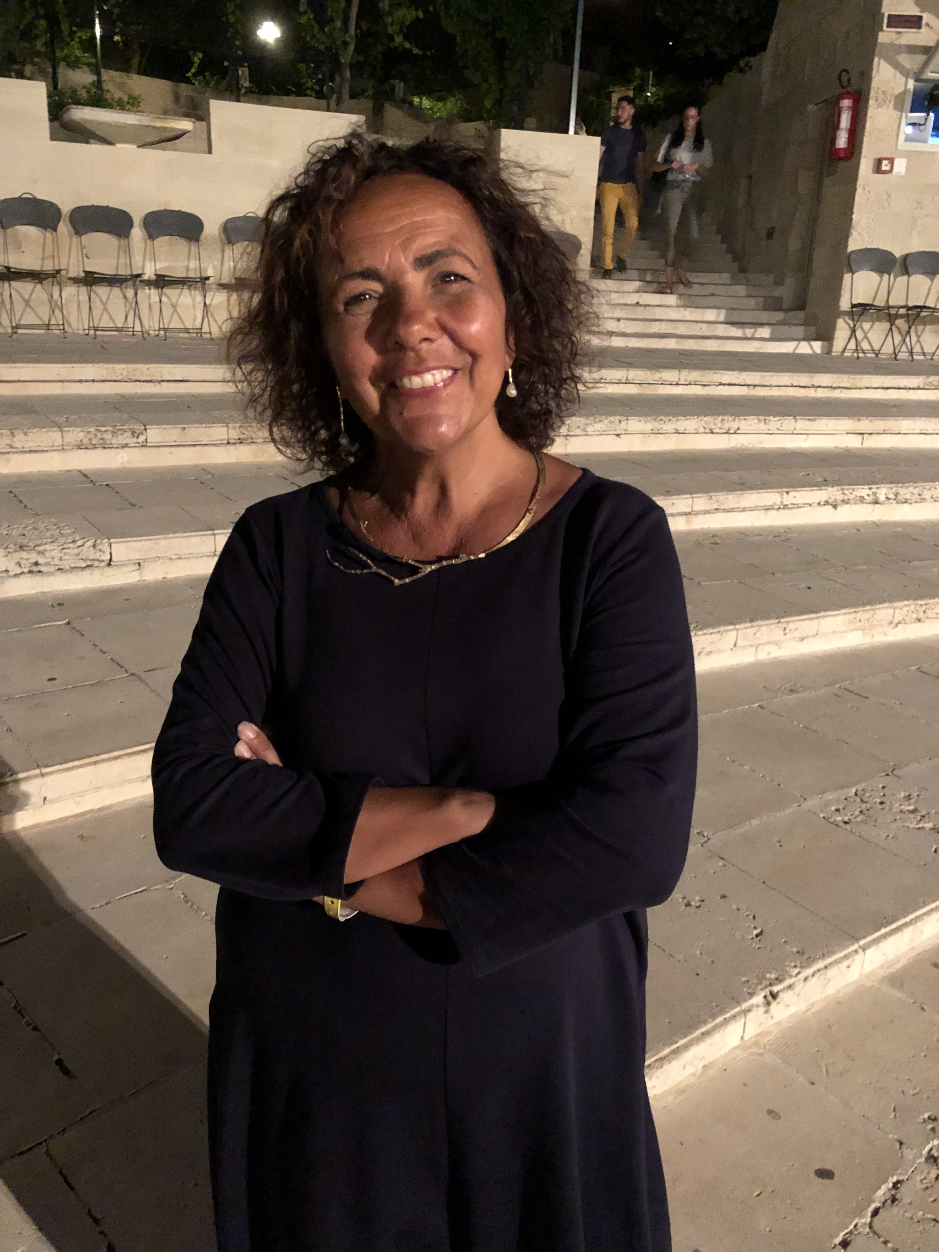 Foto di Margherita Antonelli, in vacanza presso Le Cale d’Otranto